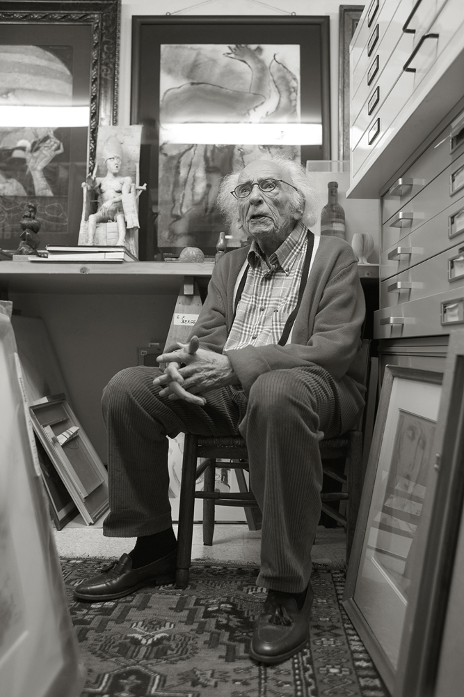 Marcel van Jole in zijn kunstkamer Foto: Nicol'Andrea